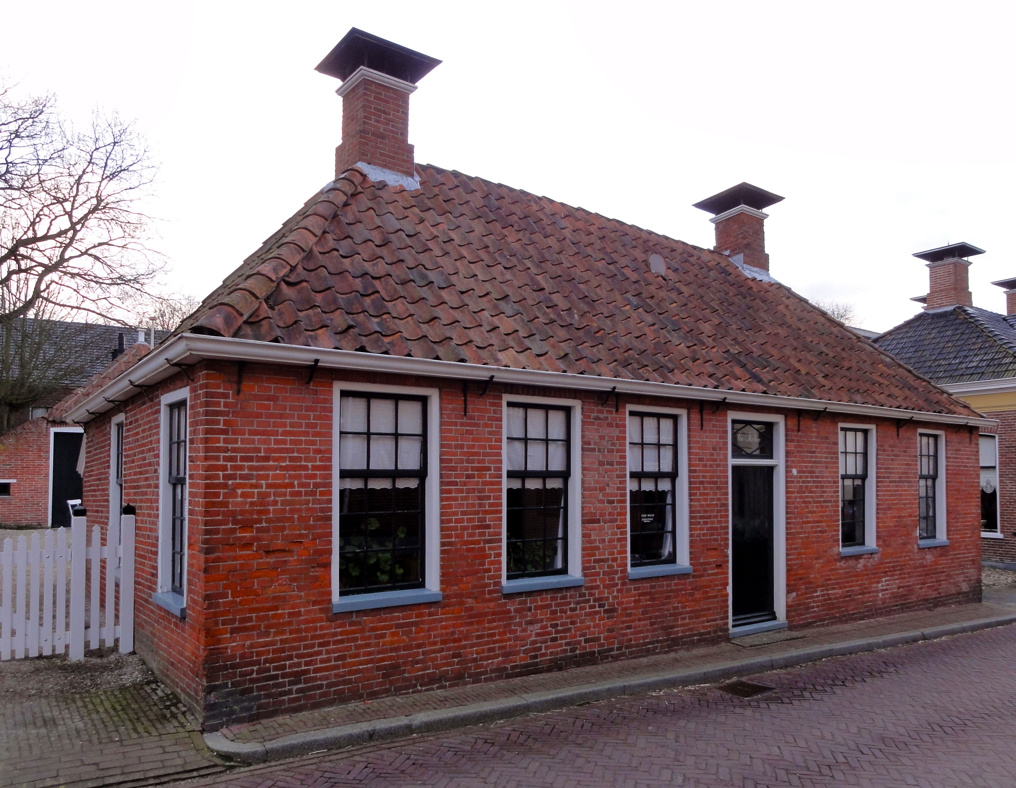 "Bie Koboa" Hoofdstraat 19 te Warffum